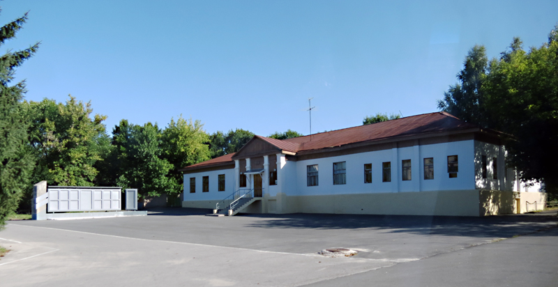 Дом кагала в Чернобыле